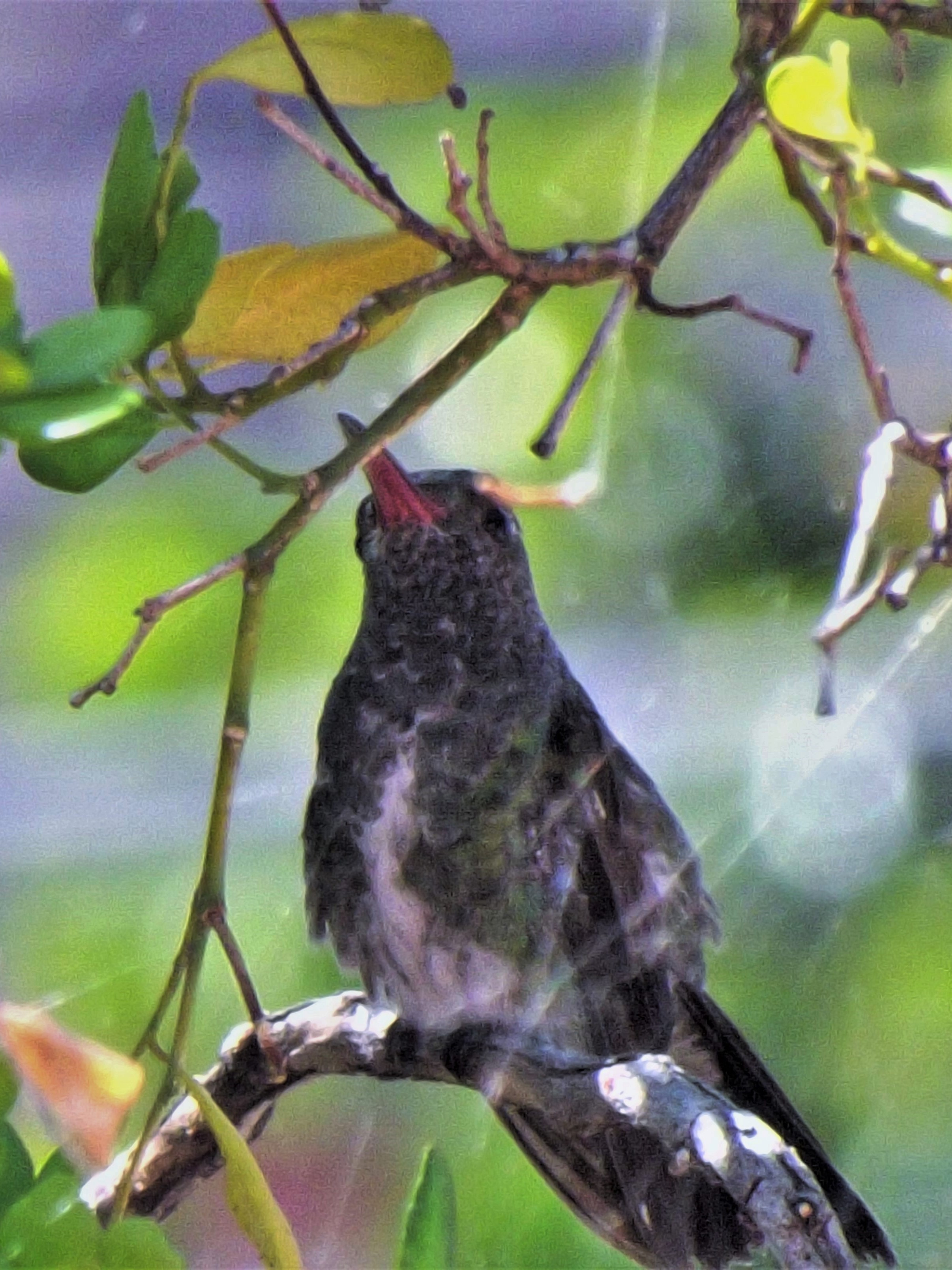 Colibrí de Pecho blanco o Diamante gargantiverde en un jardín Venezolano